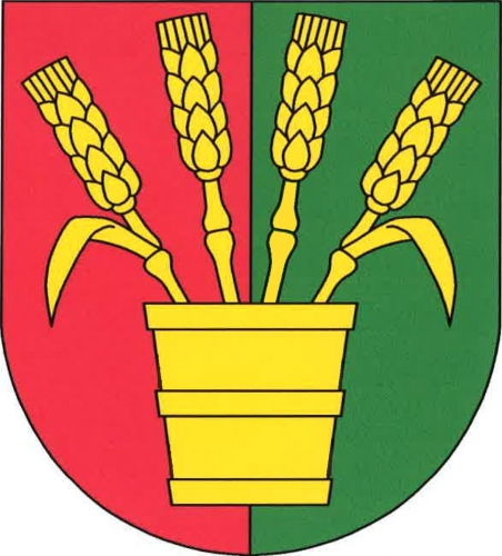 znak, Chabeřice, okres Kutná Hora